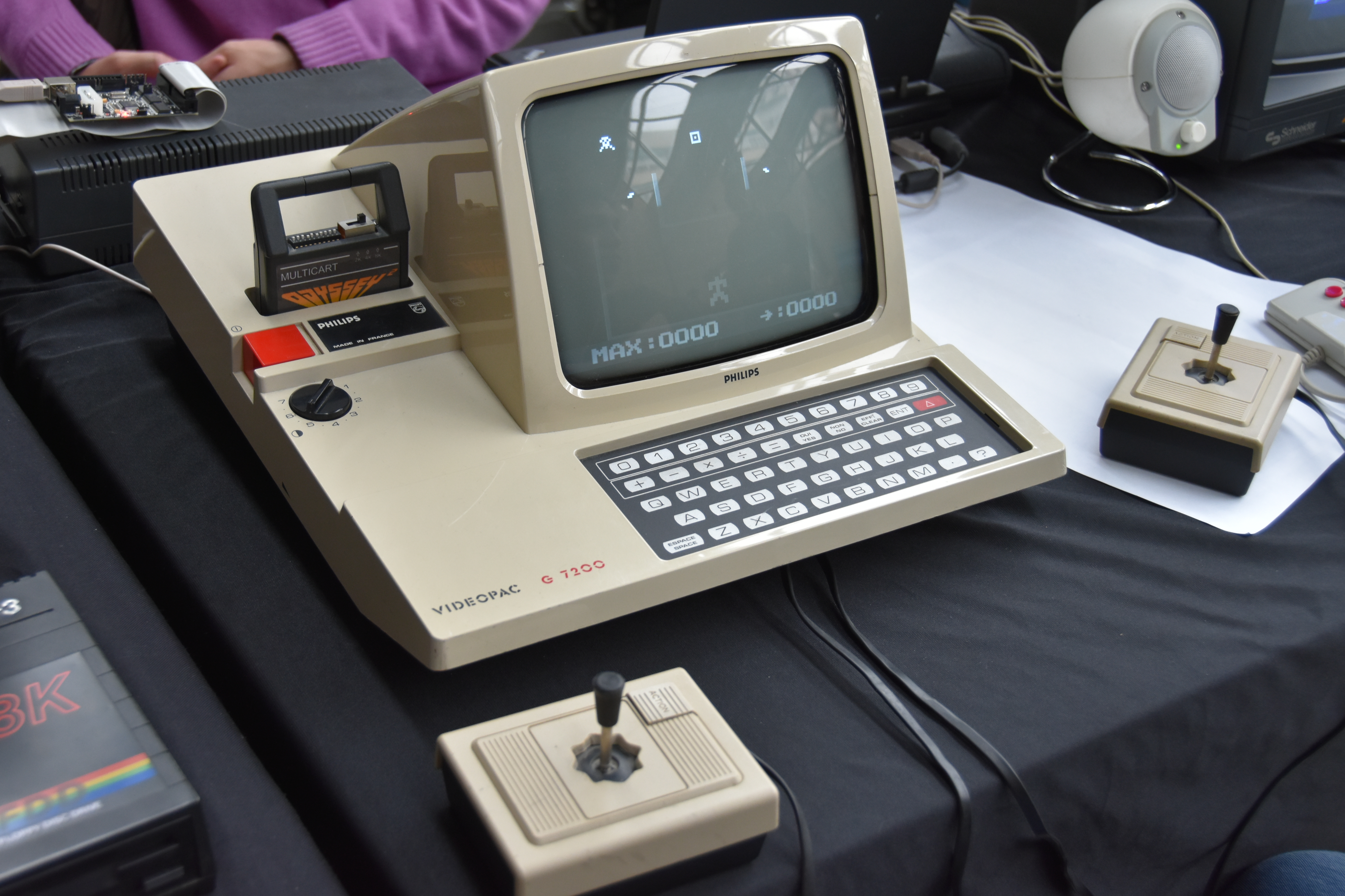 [Fotos por cortesía de Fernando Sáenz]